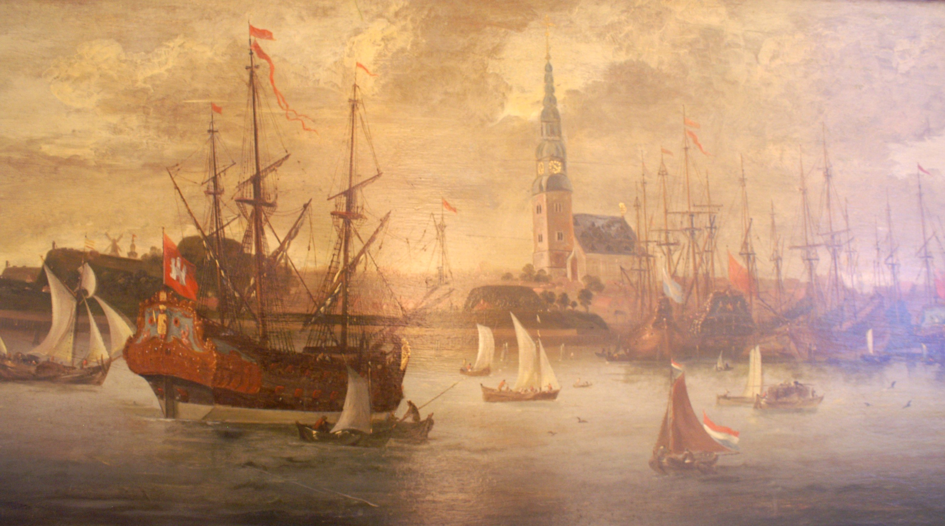 Das Schiff Leopoldus Primus, detail